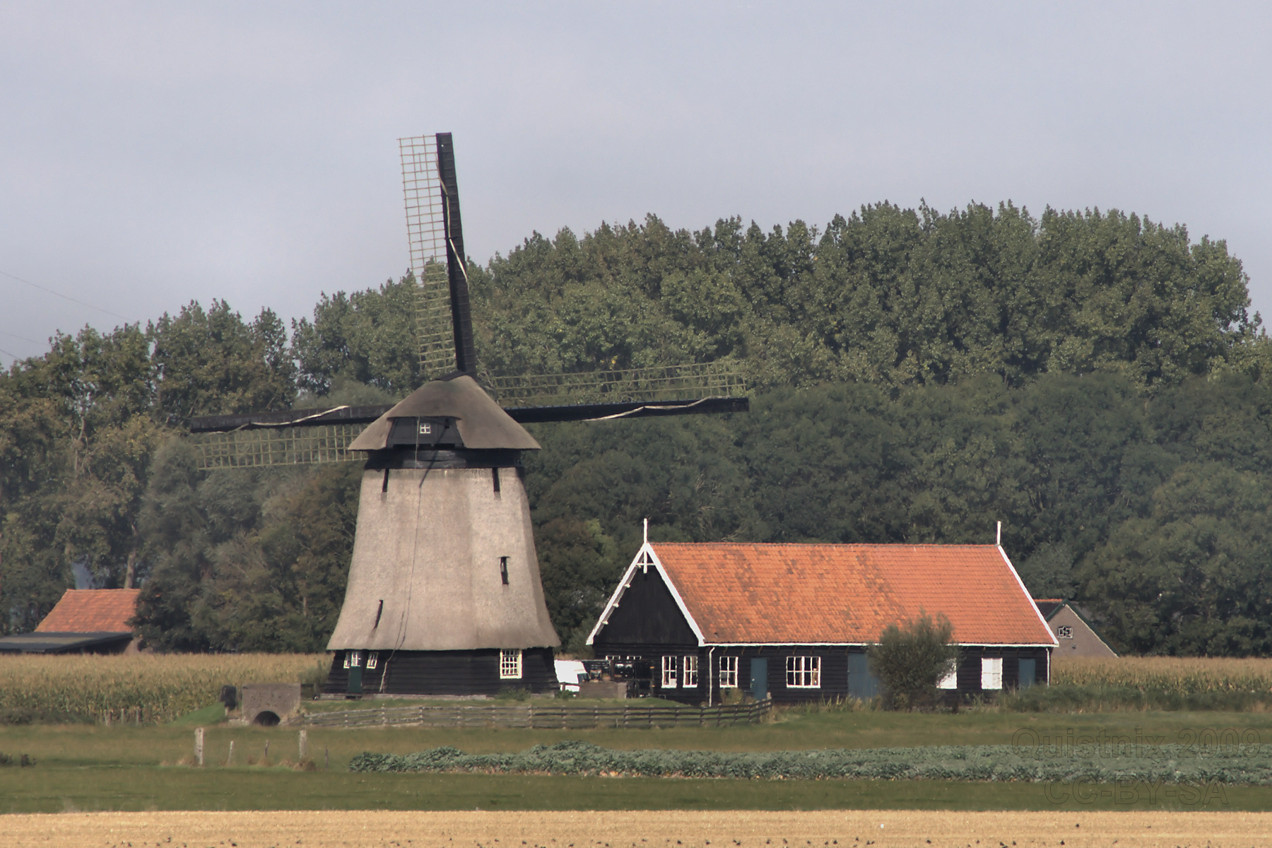 Schermerhorn: Poldermolen O, gezien vanuit het zuiden